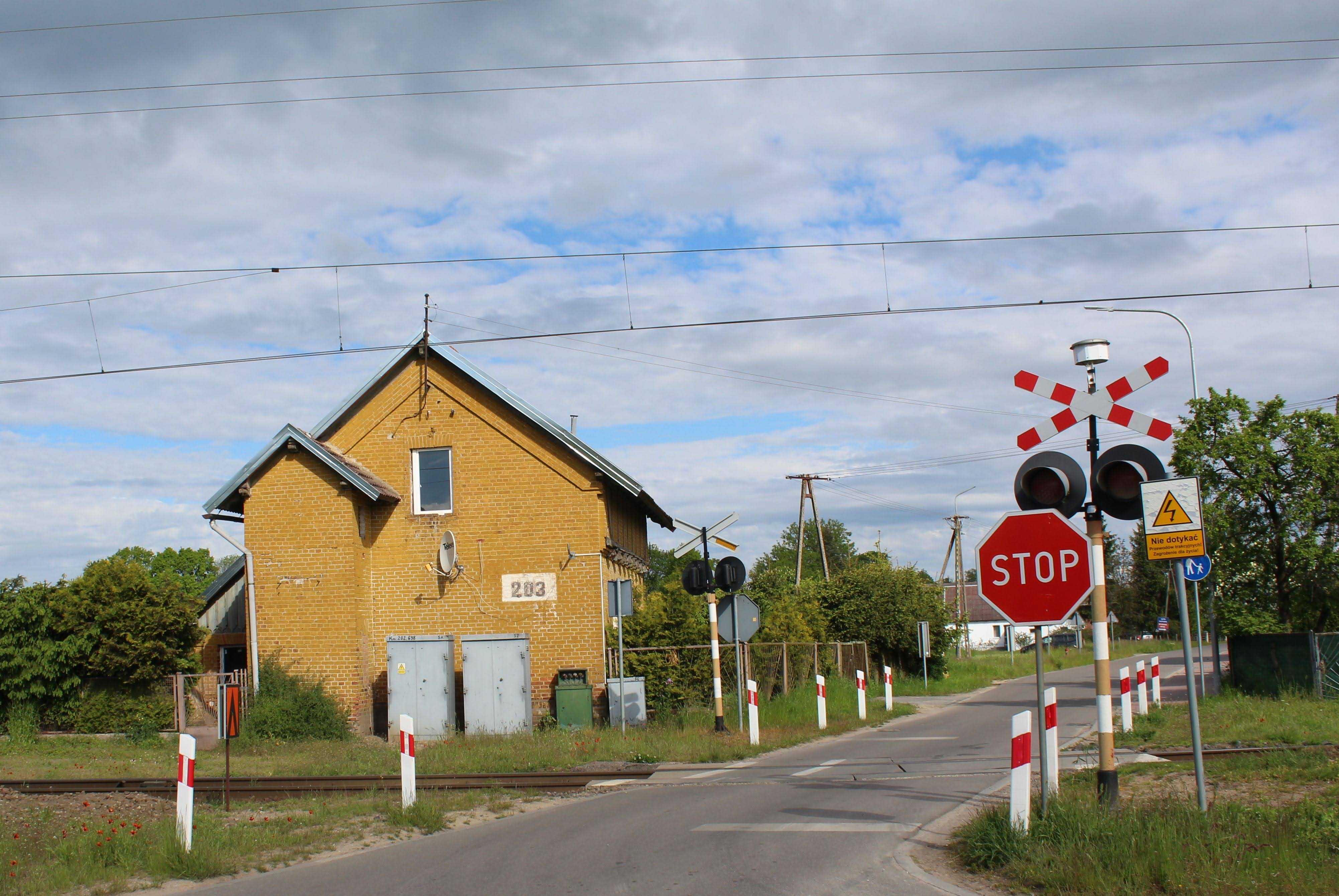 Posterunek ruchu kolejowego w Niekłonicach